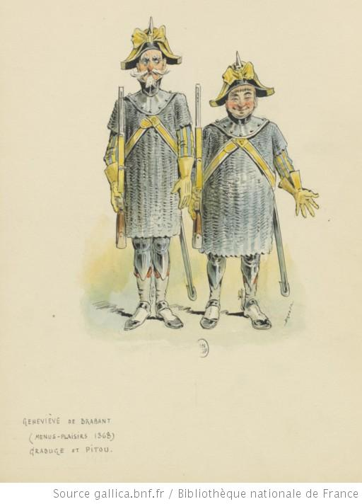 Geneviève de Brabant, opéra-bouffe de Jacques Offenbach : les gendarmes Grabuge et Pitou : dessin de Draner